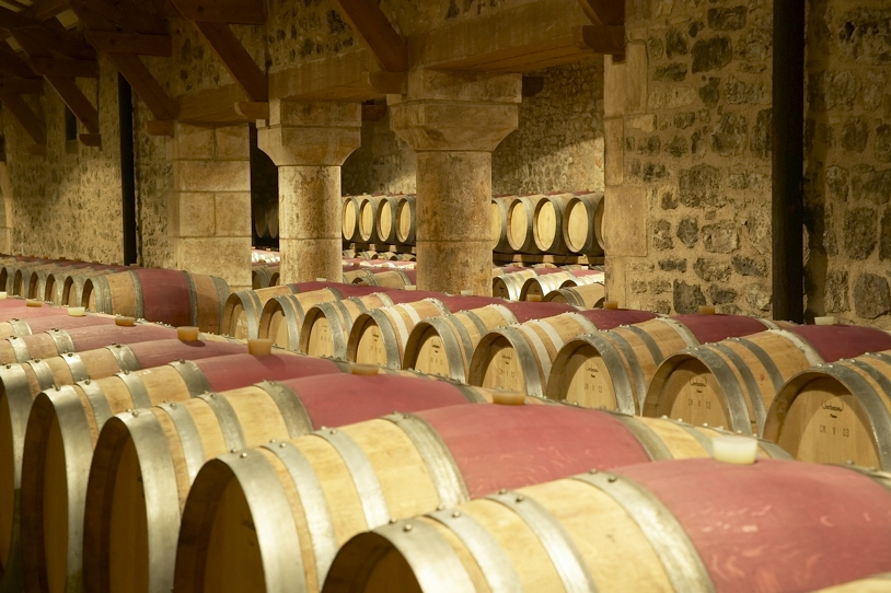 Chai à barriques Château de Chambert, Malbec, Cahors - France. Le spectaculaire chai à barriques a été aménagé dans les anciennes écuries du Château et possède 800 barriques de chêne Français de 225 litres chacune.